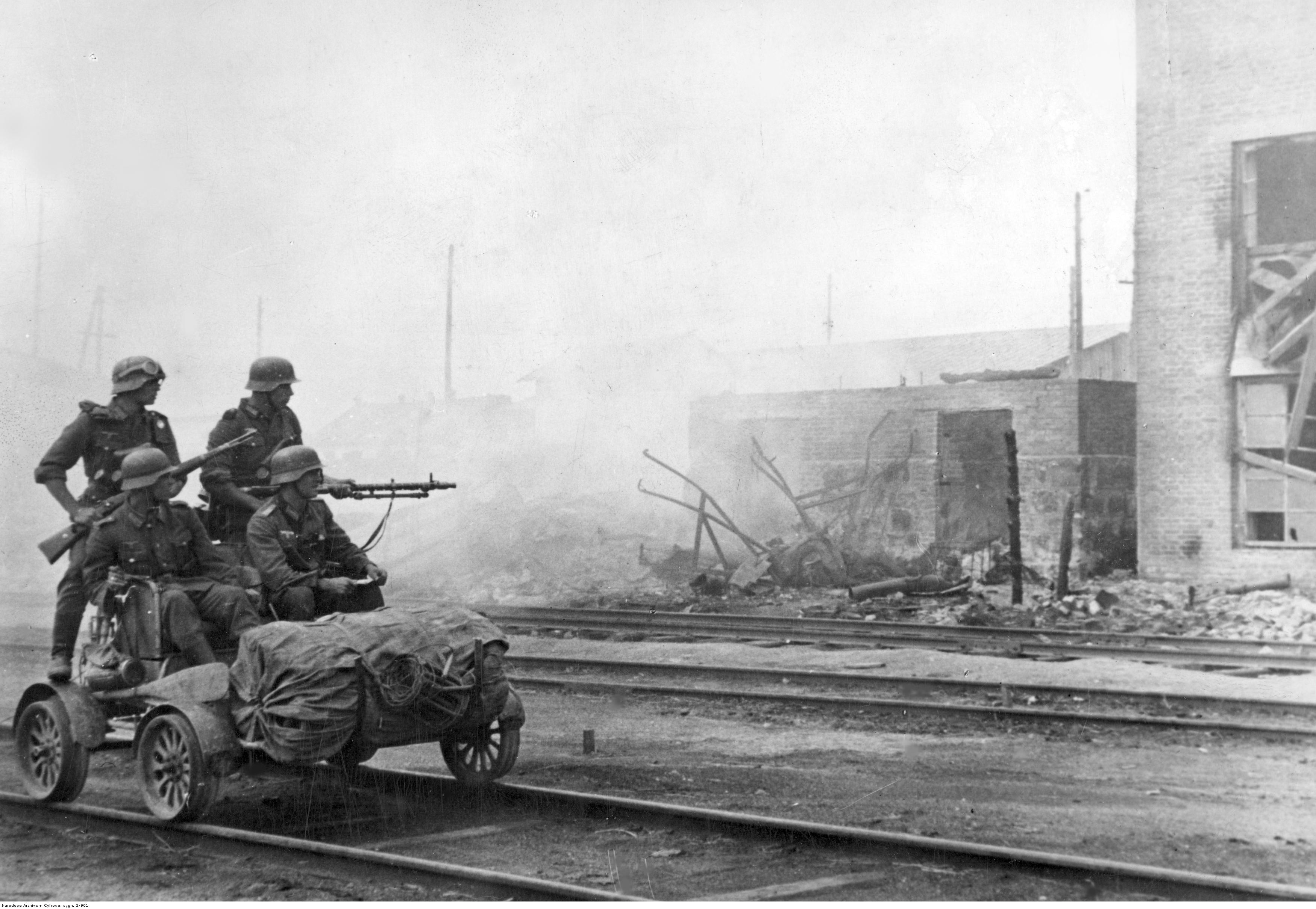 Patrol niemieckich saperów kolejowych na małej drezynie z karabinem maszynowym MG-34 w okolicach Odessy i ujścia Boha.